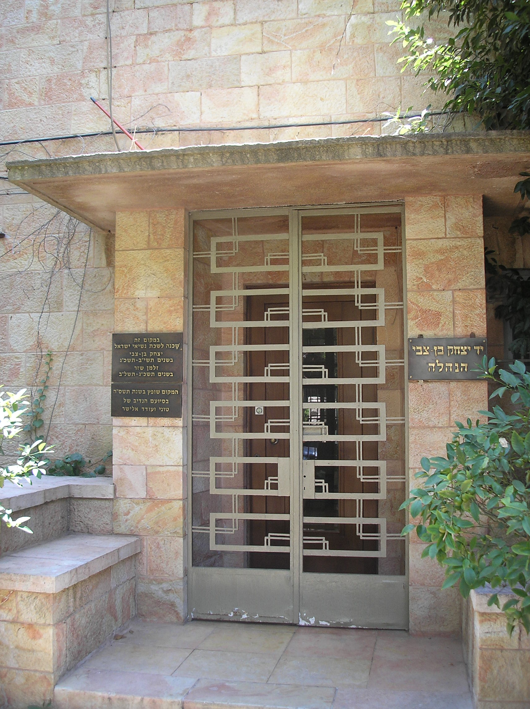 Beit Valero, part of Beit Ben zvi complex, Rehavia, Jerusalem